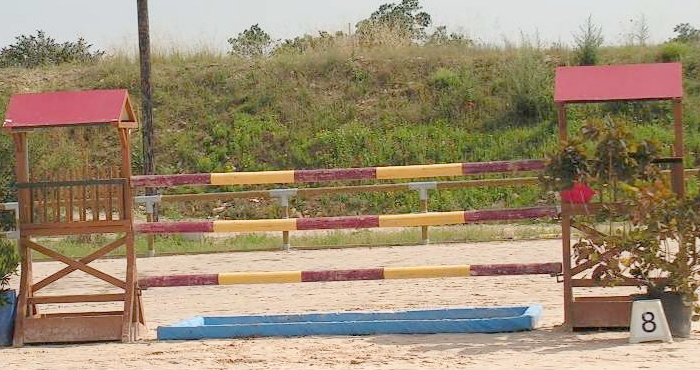 Auteur : moi-même Licence free Date : 09/07/2006 lieu : Niort (79-France)